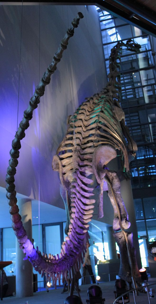 Camarasaurus In het kader van "Wiki loves art NL".